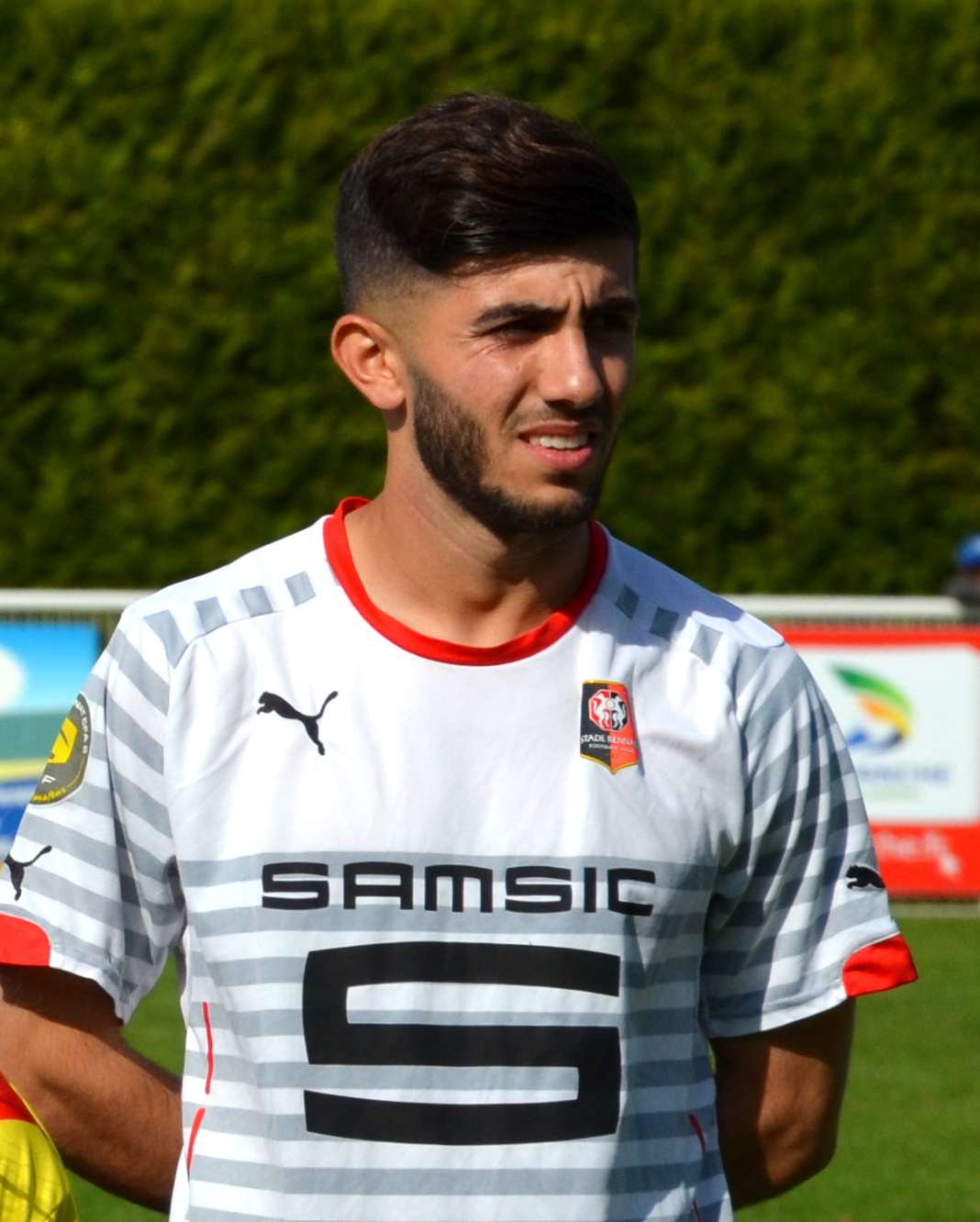 Photographie de Zana Allée lors d'un match de CFA2 opposant le FC Saint-Lô au Stade rennais le 23 mai 2015.